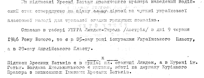 Витяг з протоколу посвячення прапора Хмельнченків